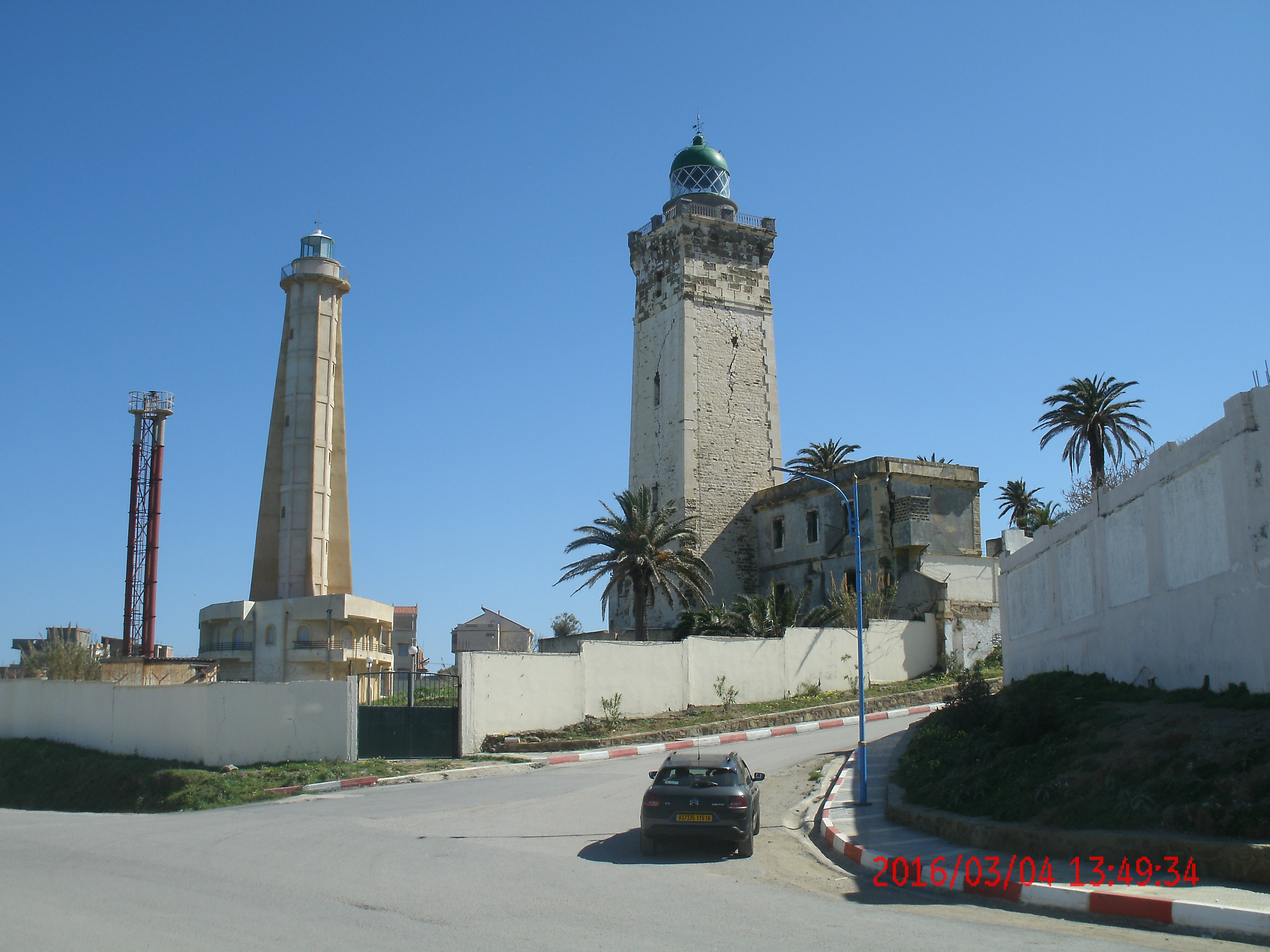 Les deux phares de cap Bengut à Dellys